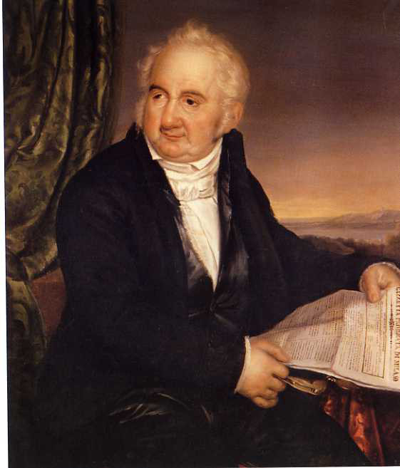 Foto di ritratto -del 1840- di Bottaini vicepresidente CCIA Bergamo 1812-1840